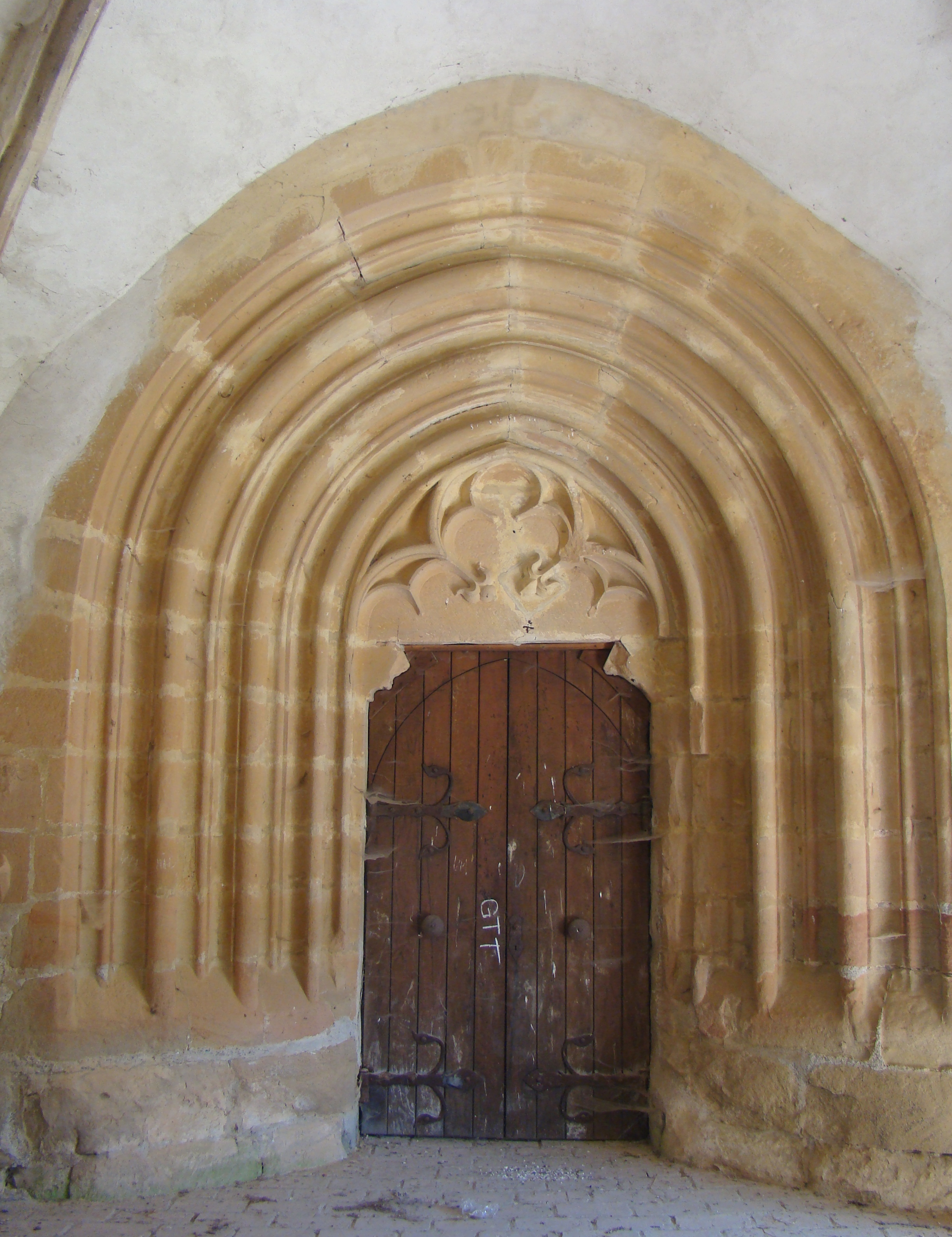 Ansamblul bisericii evanghelice fortificate, sat Șoarș; comuna Șoarș 282 sec. XV - XIX